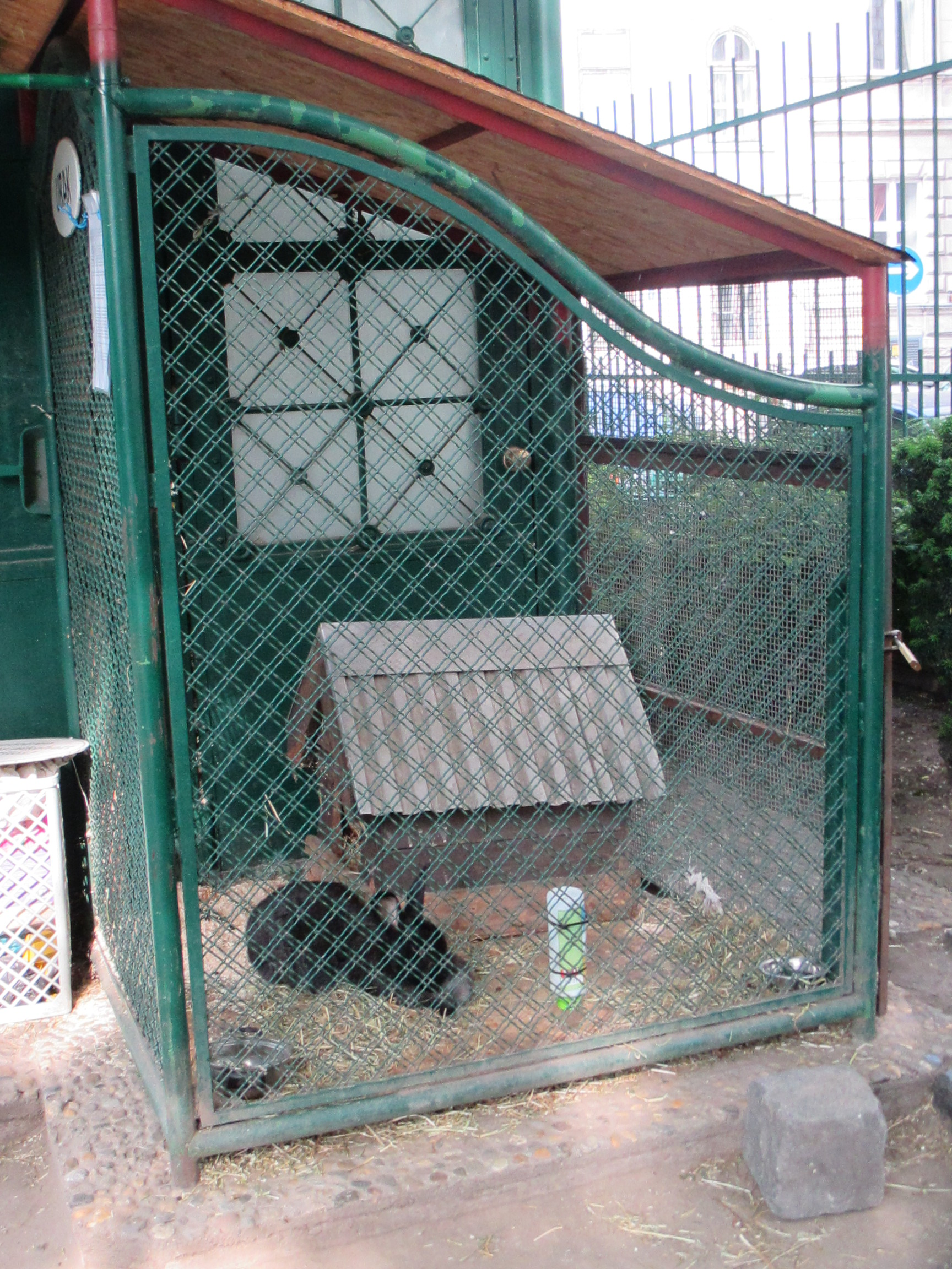 Károly, a Károlyi-kert nyula (Budapest, V. ker.)